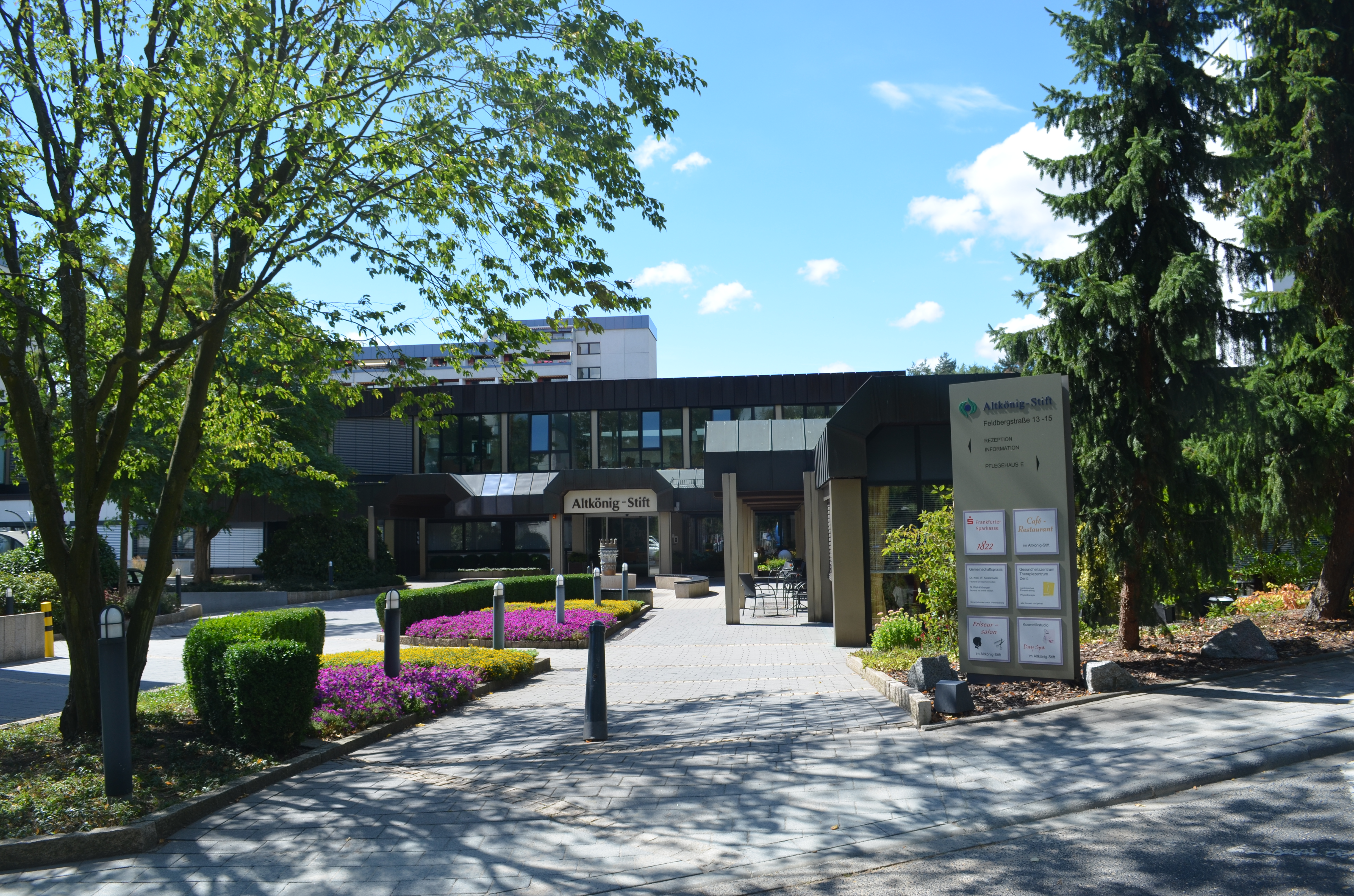 Altkönigstift, Eingang